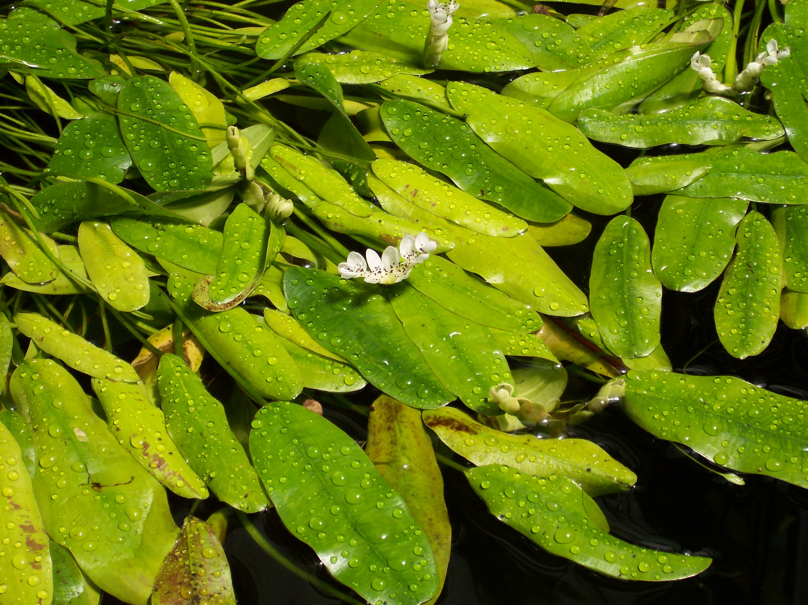 Aponogeton distachyos. Real Jardín Botánico, Madrid, España.